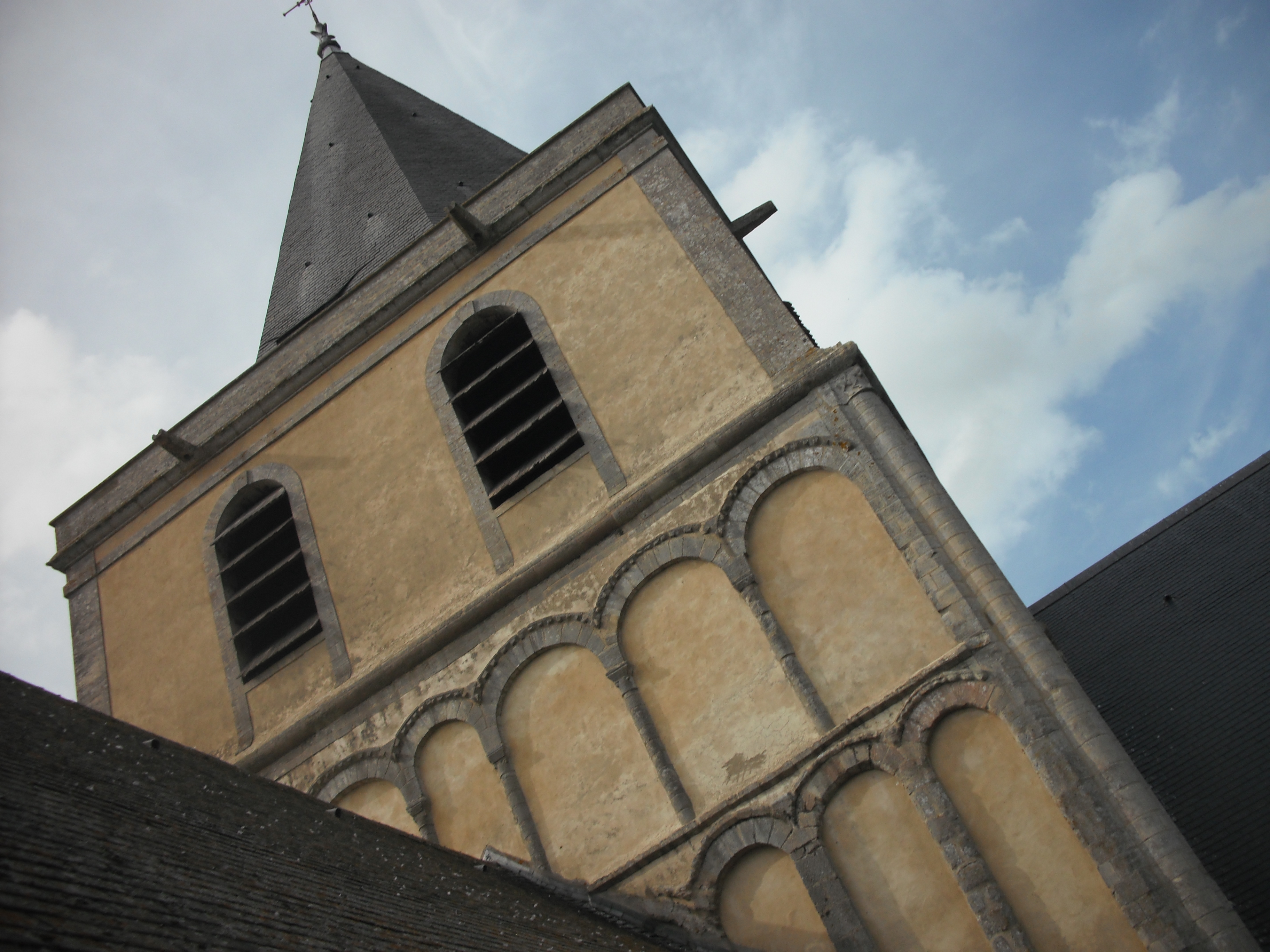 Clocher de l'abbatiale de Cerisy